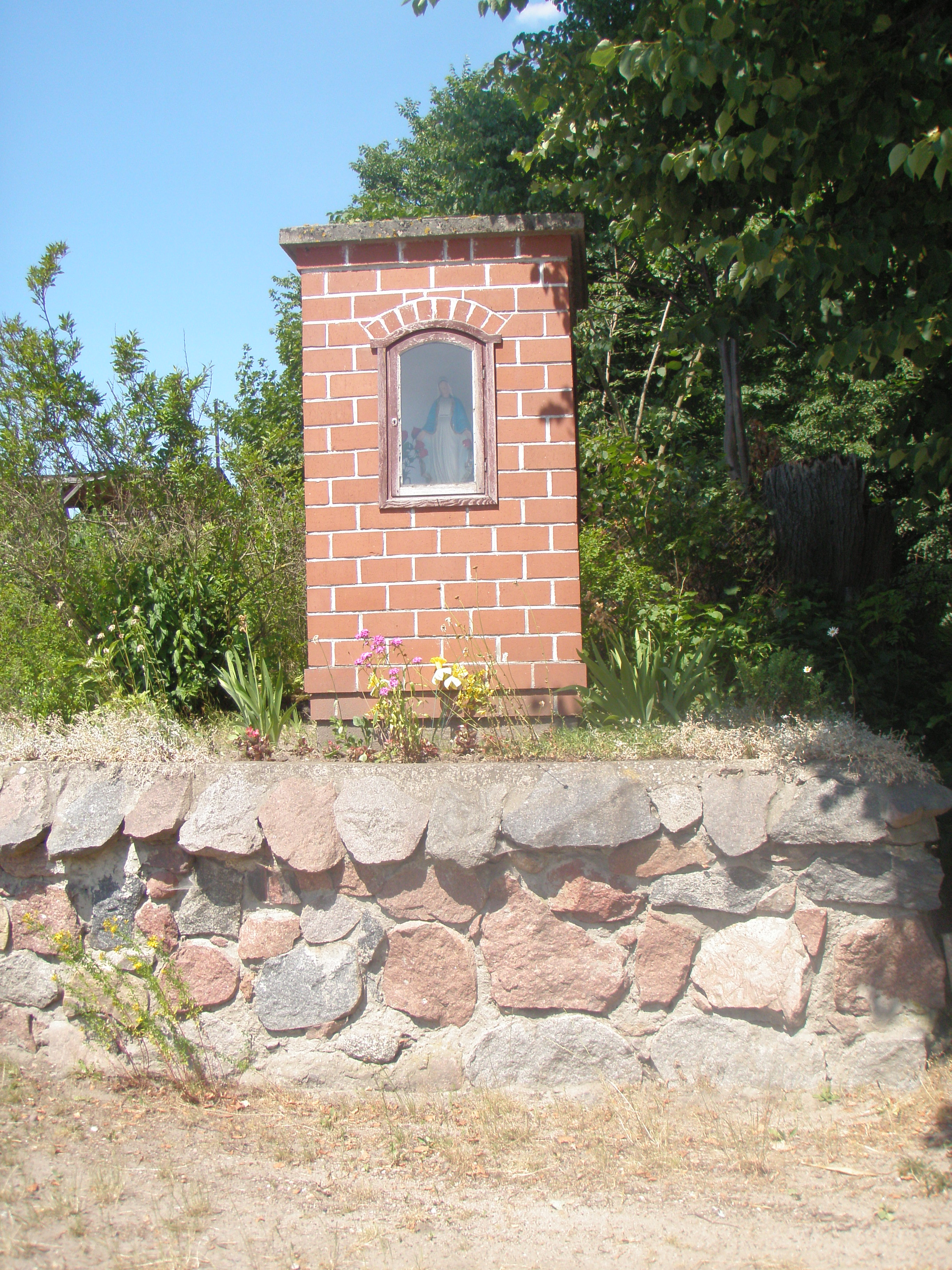 Czapielsk, ul. Słonecznikowa - kapliczka przydrożna